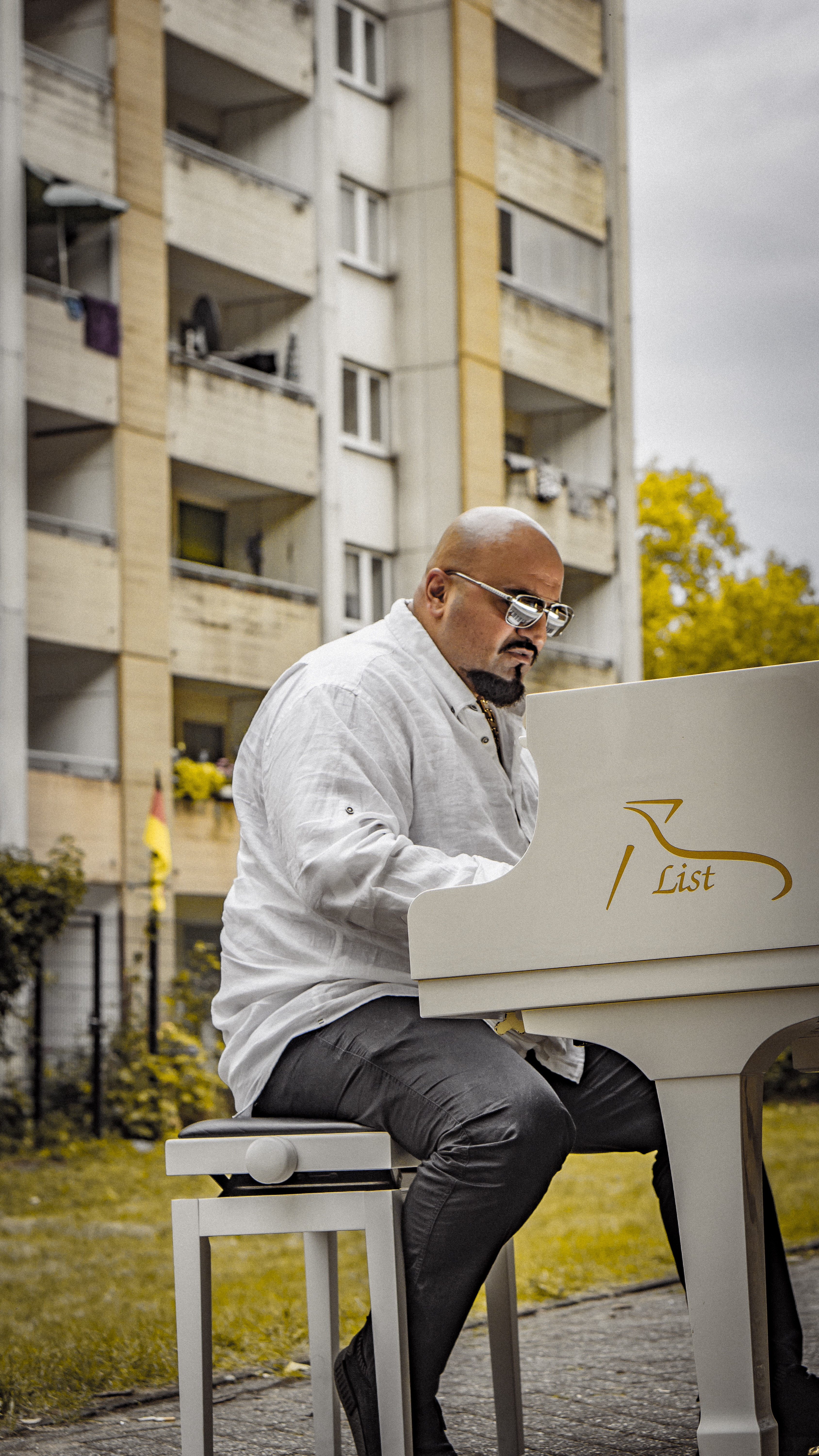 Xatar